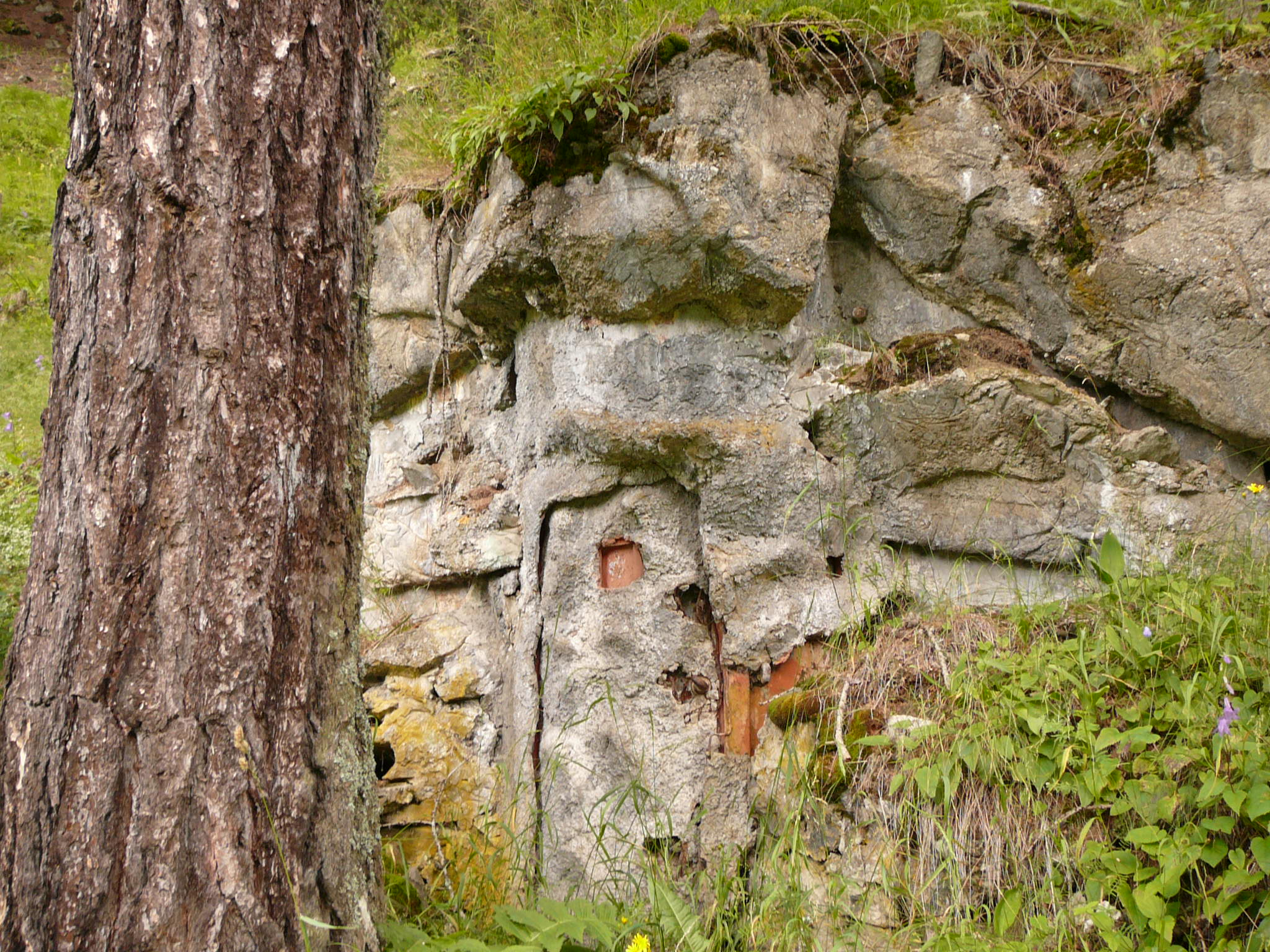 Opera IV, sbarramento Resia